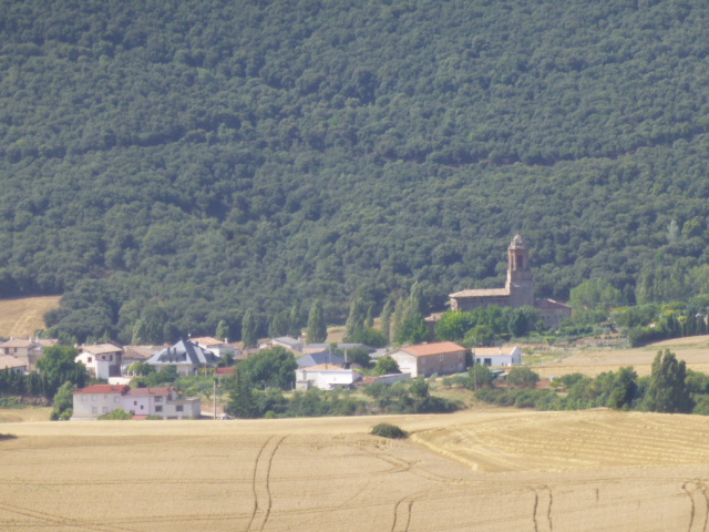 Iturriaga edo Mirafuentes Nazar aldetik ikusita